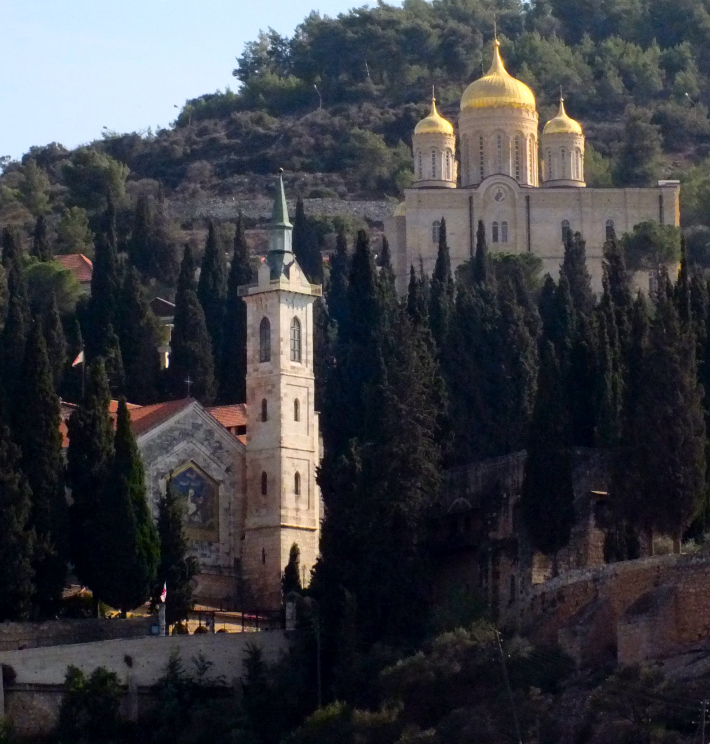 מנזר גורני (או גורננסקי), המוכר גם בשמו הערבי מוסקוביה, הוא מנזר בו מתגוררות נזירות רוסיות אורתודוקסיות. בתחילה שימש כאכסניית צליינים. ב-1911 יזמה הנסיכה אליזבת, אשתו של מושל מוסקבה, את בניית "כנסיית כל הקדושים של רוסיה". בנייתה הופסקה במלחמת העולם ה-I, והתחדשה רק ב-2003. הכנסייה בסגנון רוסי עם צריחי "בצל", וב-2009 כיפותיה צופו זהב.